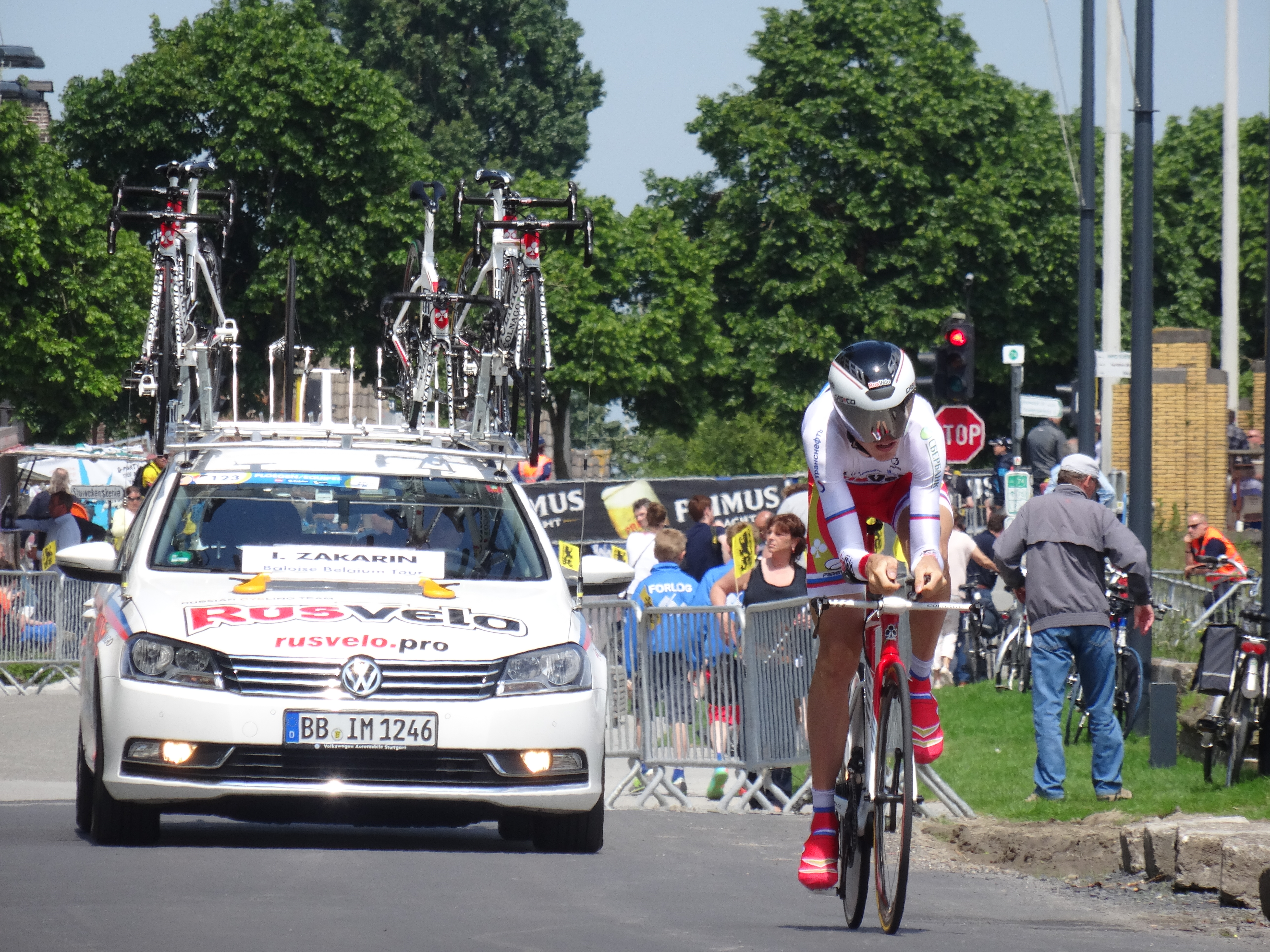 Reportage photographique réalisé le vendredi 30 mai à l'occasion du contre-la-montre individuel de la troisième étape du Tour de Belgique 2014 à Dixmude, Belgique.